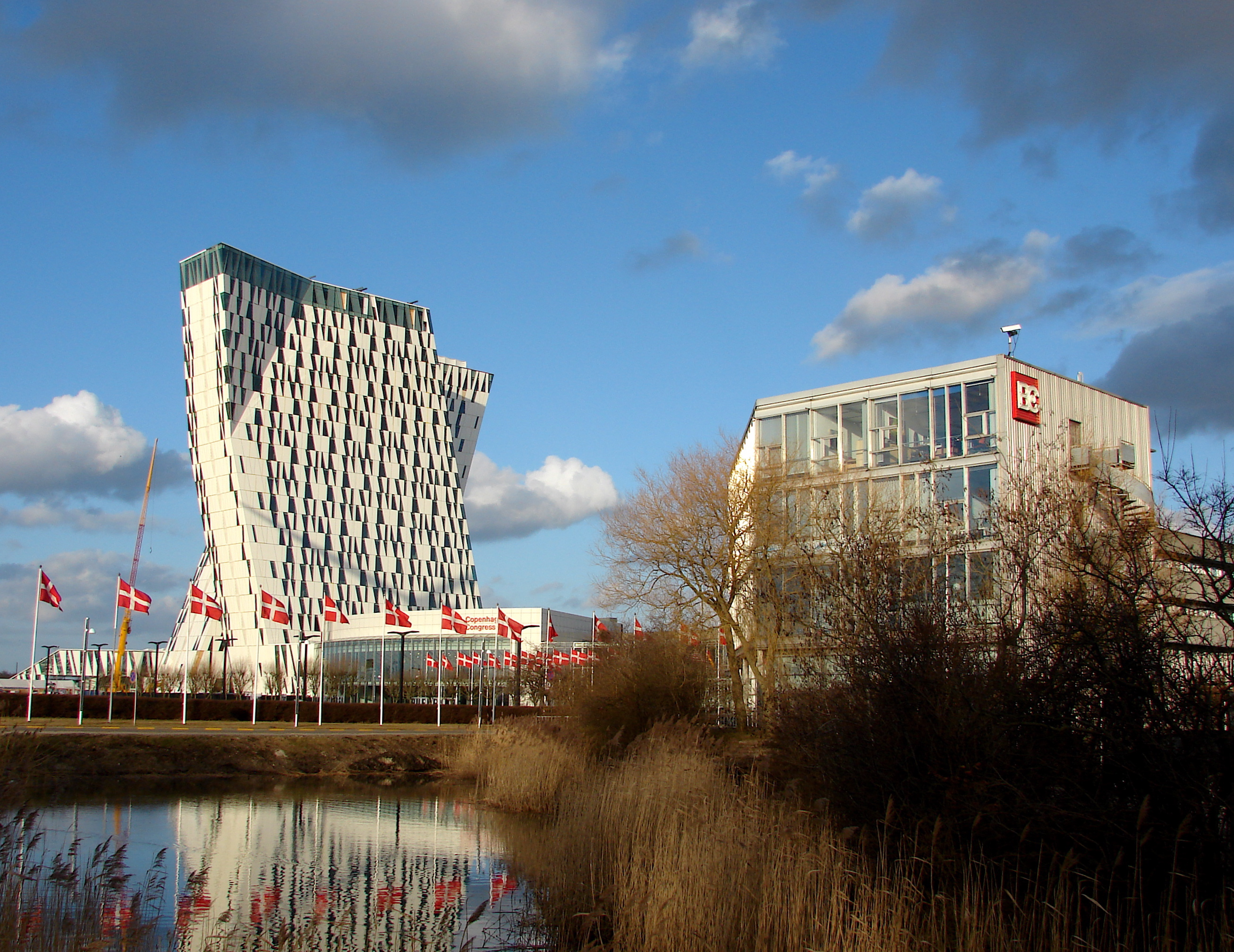 Bella Center og Bella Sky, Ørestad, Amager ved København